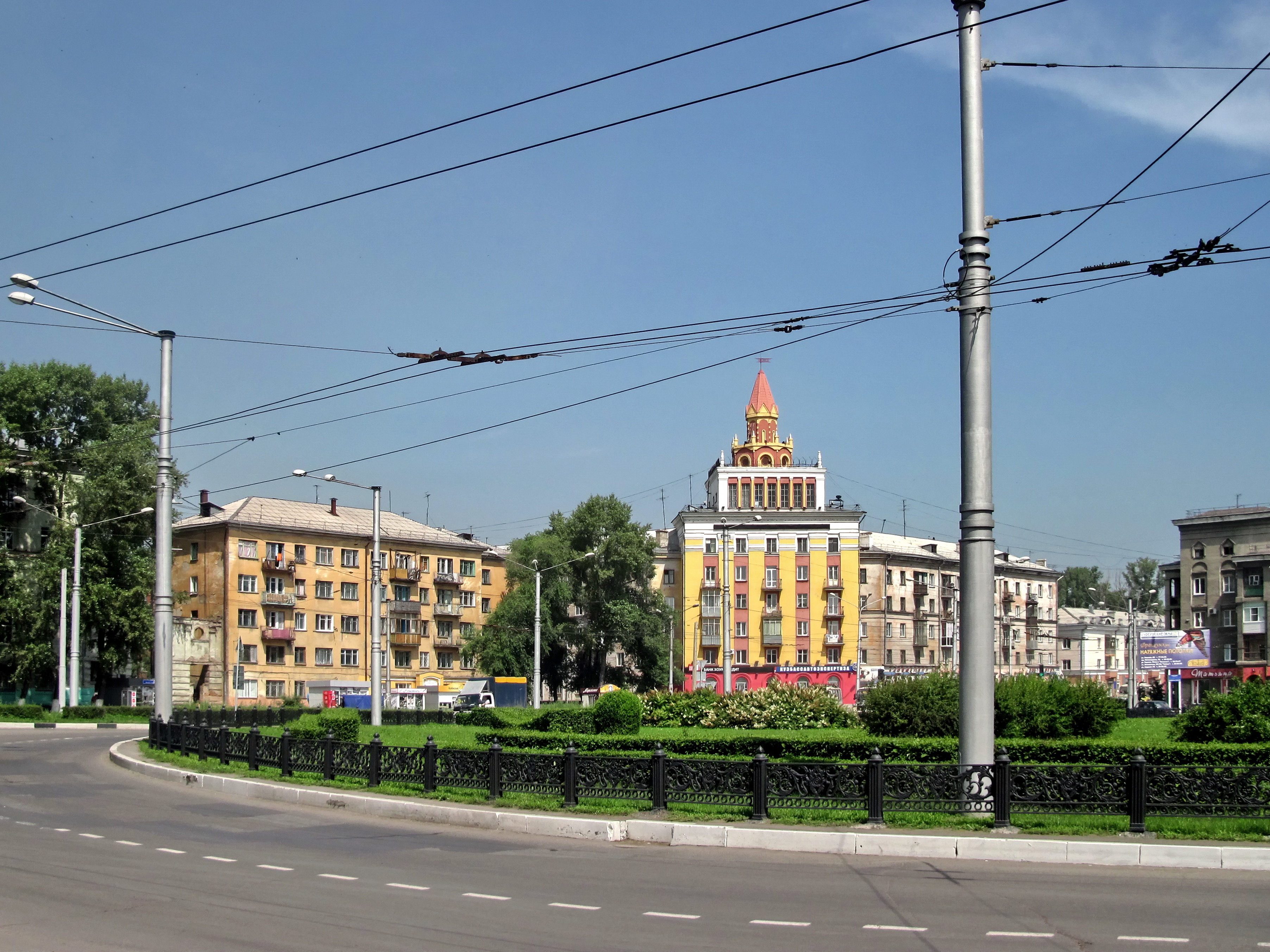 Пр. Строителей